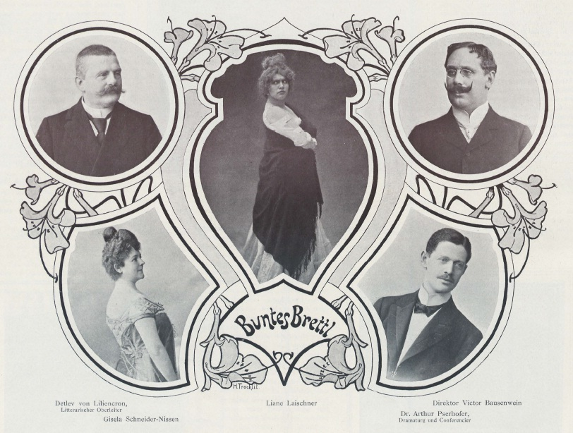 Berliner Kabarett "Buntes Brettl" 1901. Abgebildete Personen: Detlev von Liliencron, Gisela Schneider-Nissen, Liane Laischner (Leischner), Victor Bausenwein, Arthur Pserhofer